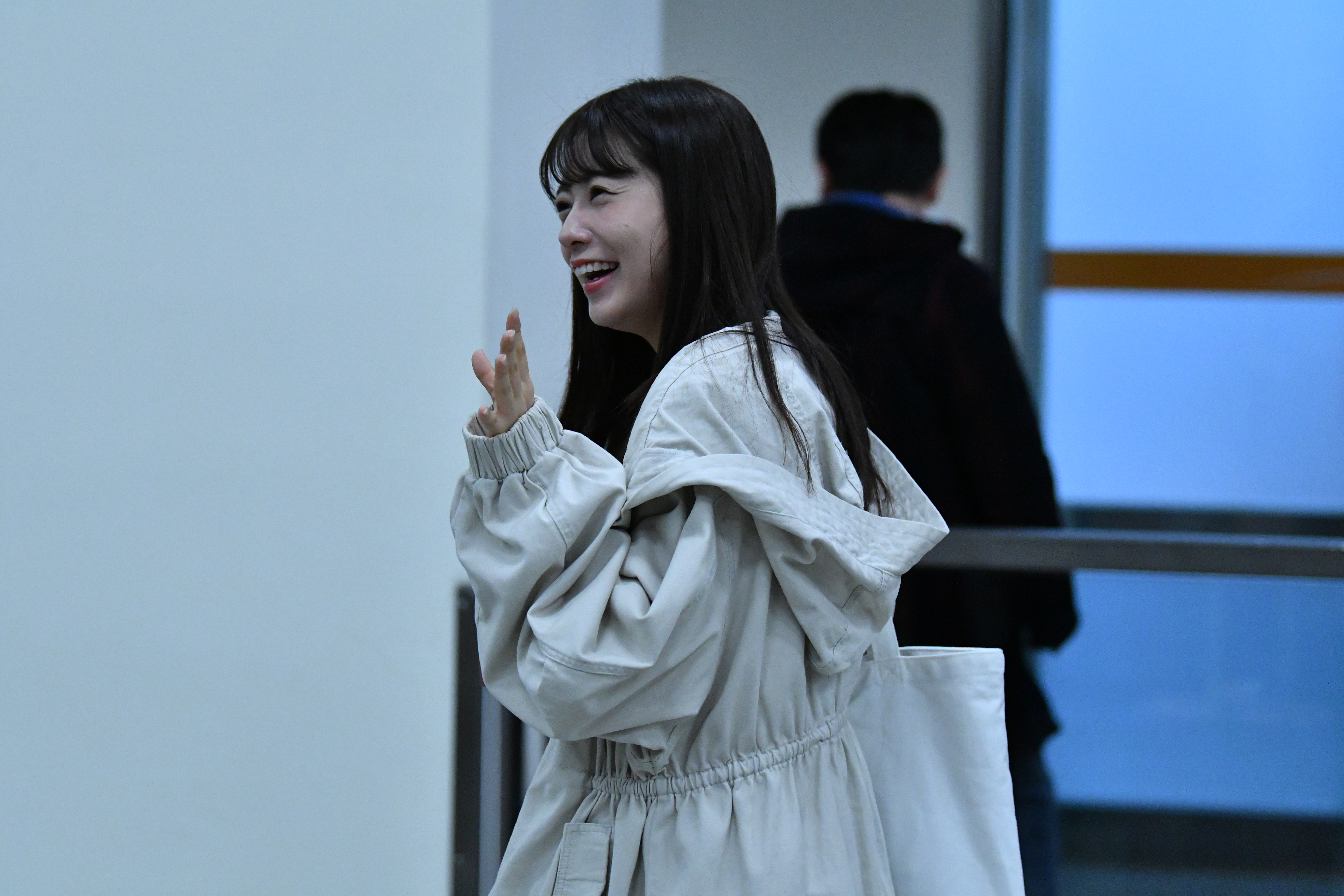 乃木坂46成員在台北國際松山機場。